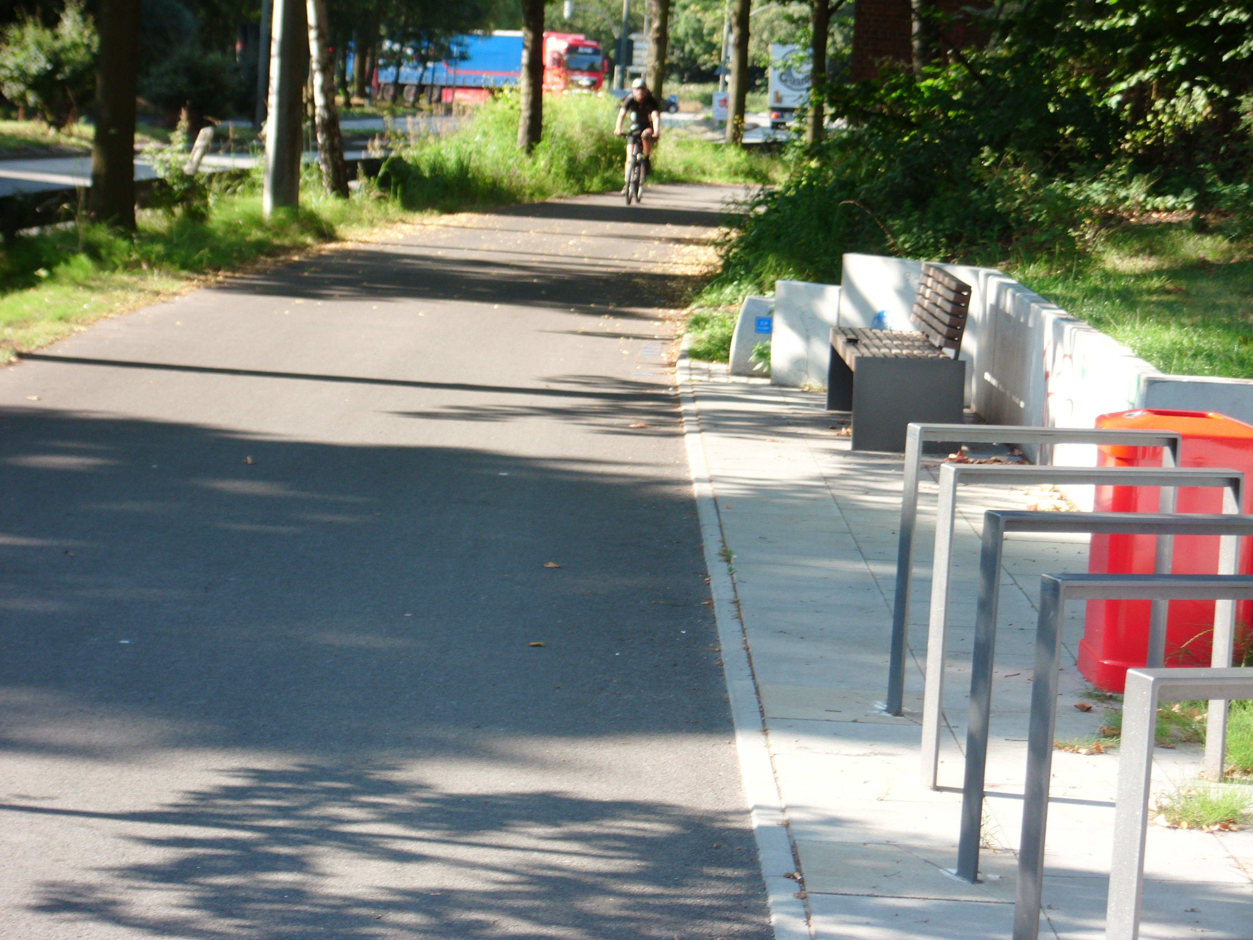 Typische Ausstattung des Rundkurses Loop